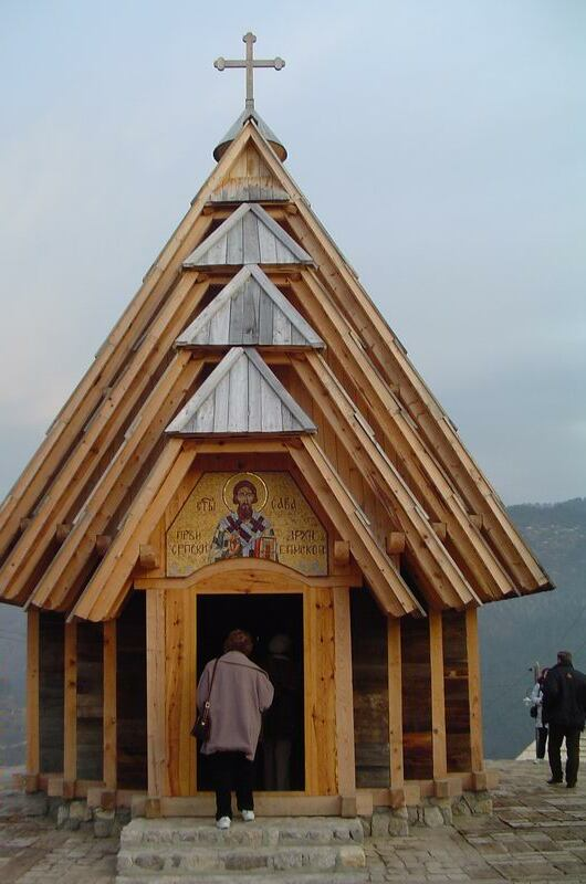 Church in Ethno village Drvengrad, near Užice, Serbia/L'église en bois de l'ethno-village de Drvengrad, près d'Užice, Serbie